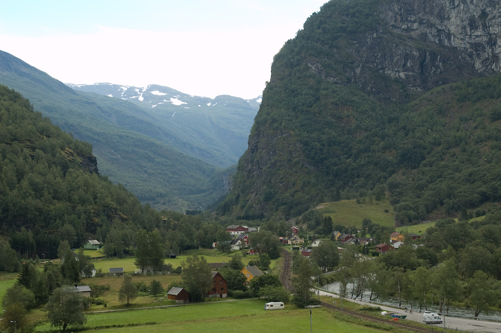 Parti fra Flåm, Aurland.